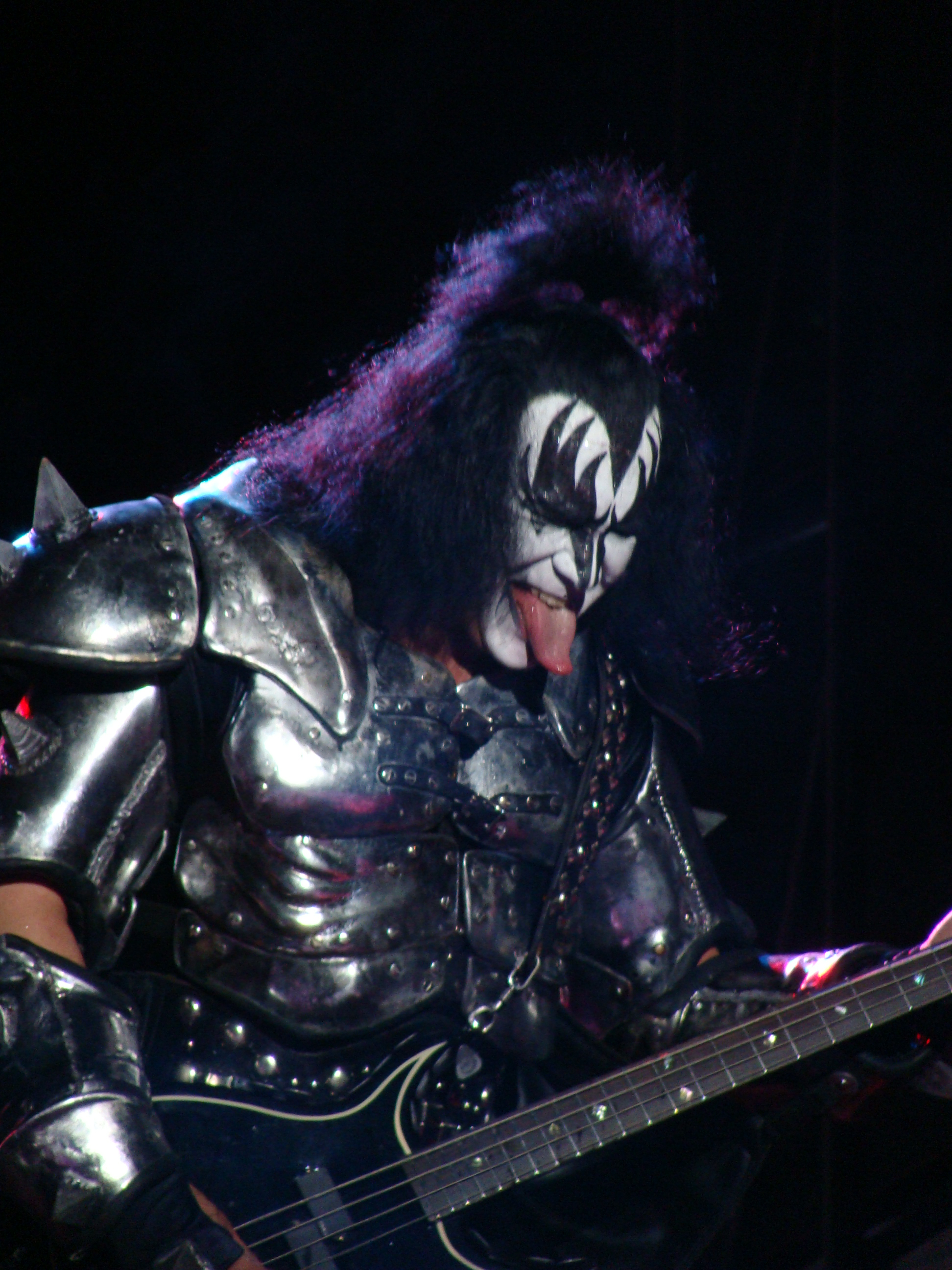 Gene Simmons, en una actuación del grupo KISS en Vitoria-Gasteiz, en el Azkena Rock Festival.